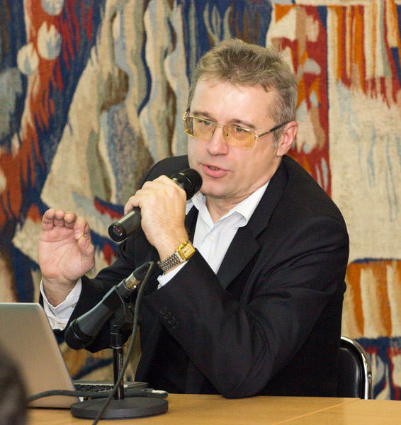 Олесь Гоян